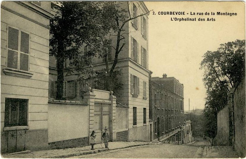 Carte postale ancienne (vers 1920) de l'Orphelinat des Arts à Courbevoie.